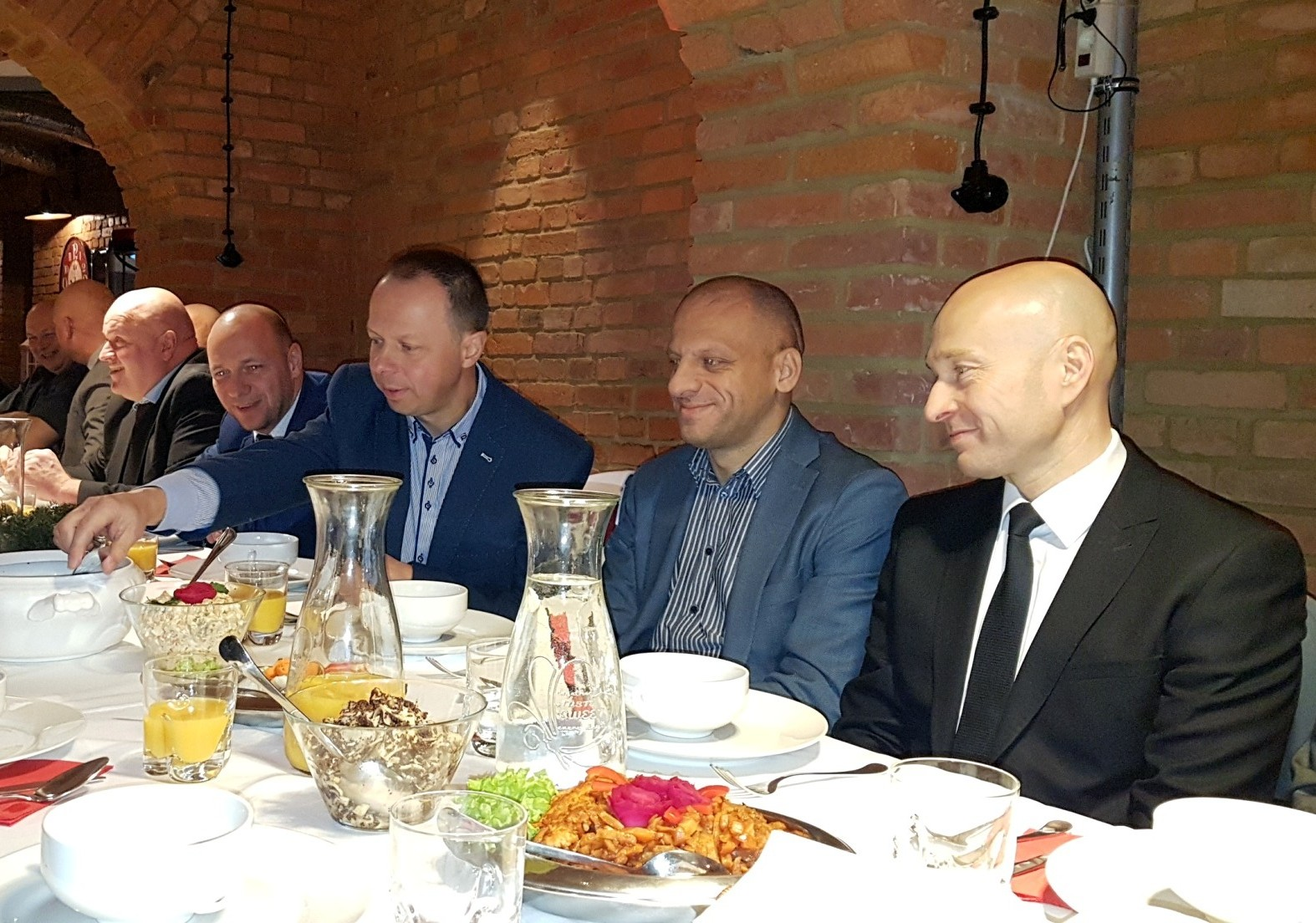 Prezedynt Stargardu Rafał Zając podczas wigili (20.12.2018)